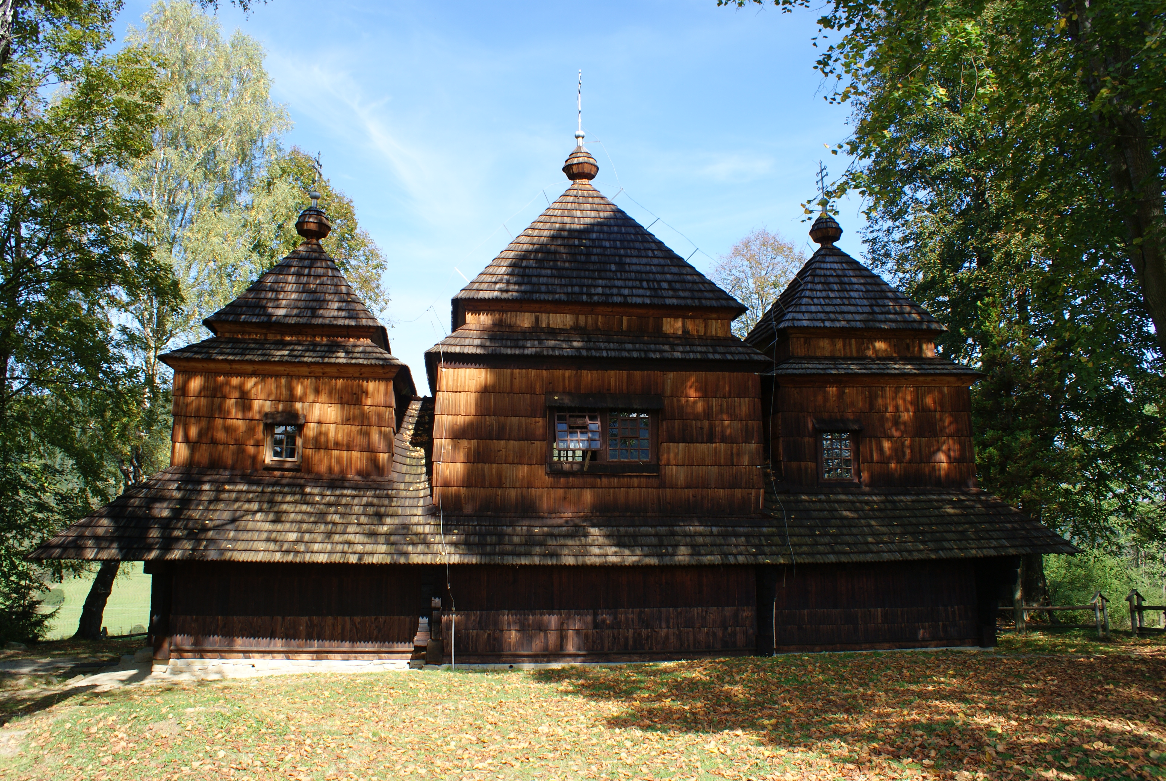 Cerkiew św. Michała Archanioła w Smolniku widok z boku